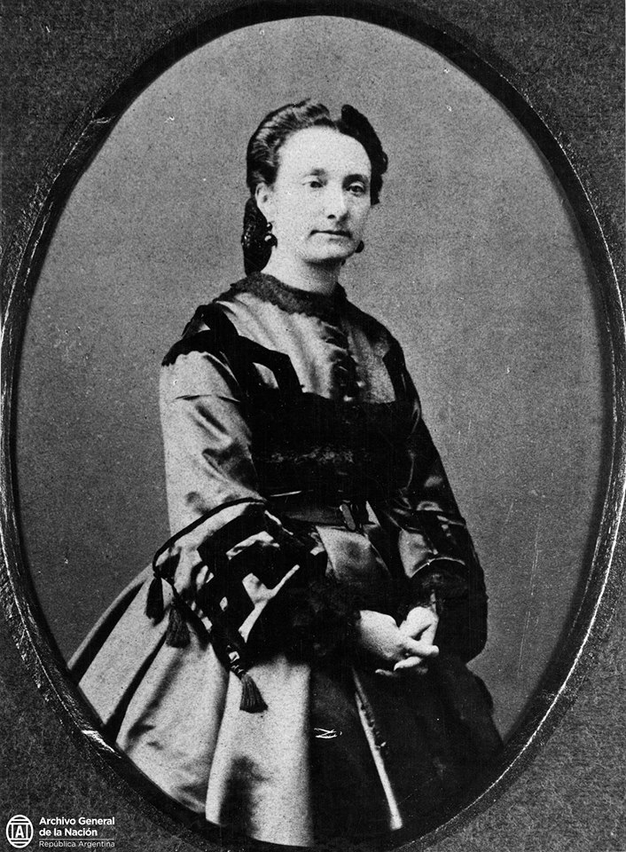 Daguerrotipo de Mercedes San Martín de Balcarce, hija del prócer, s/f. Documento fotográfico. Inventario 29583.